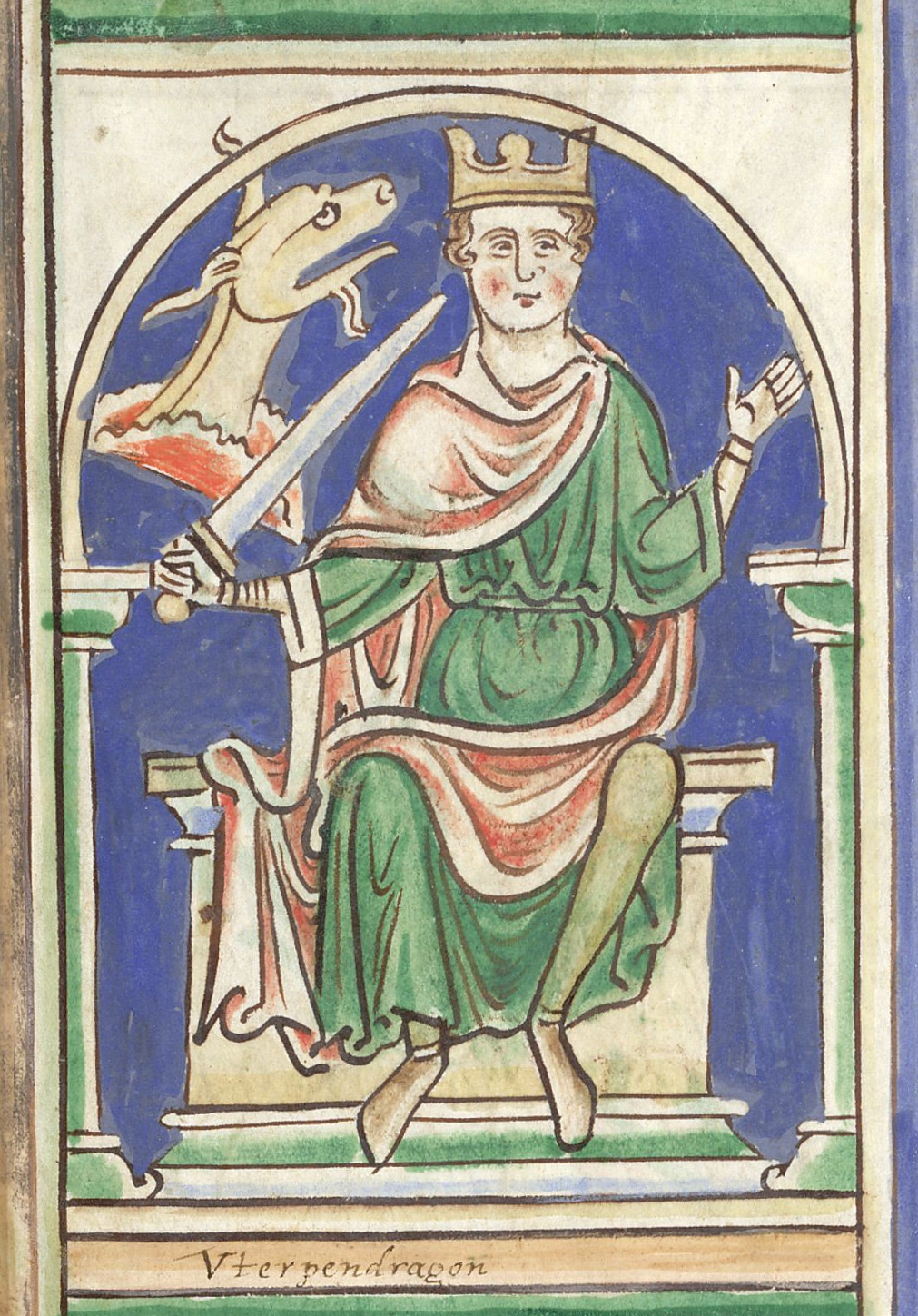 Uther Pendragon from Epitome of Chronicles